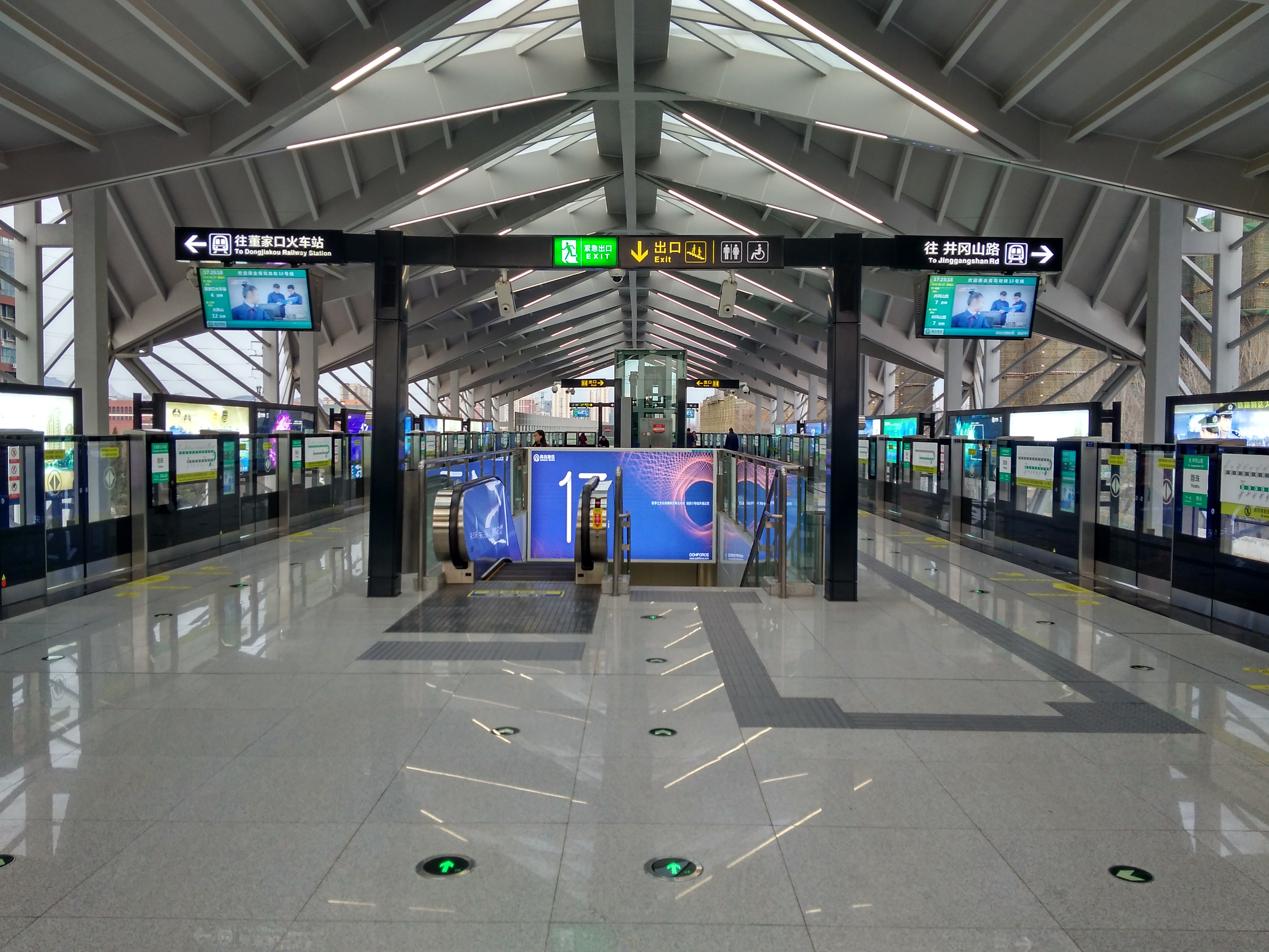 隐珠站站台